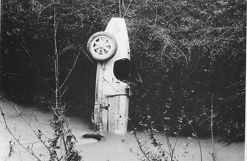 Fatal crash de Pietro Bordino au volant d'une Bugatti Type 35C le 15 avril 1928, Alessandria Circuit.